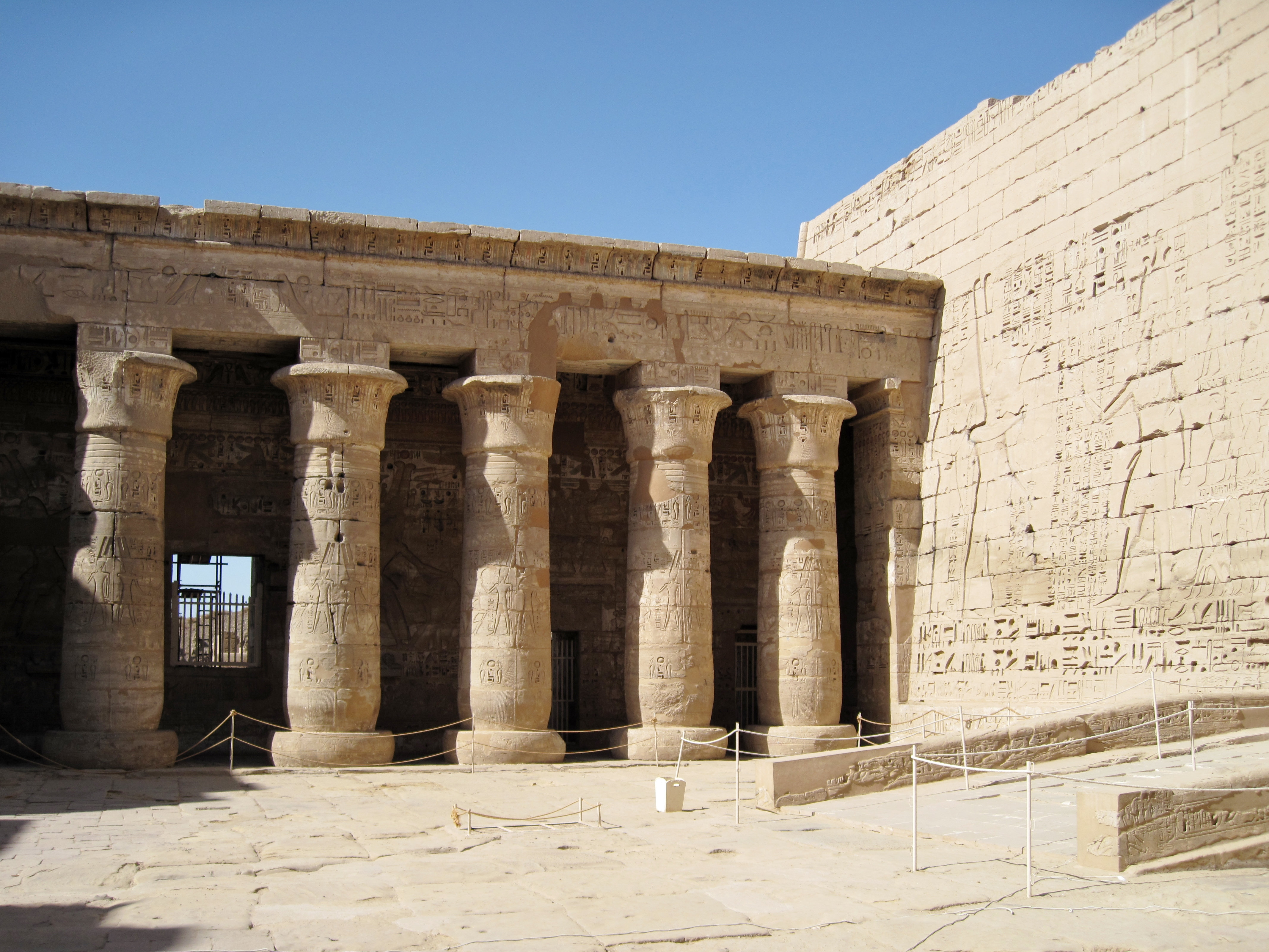 Erster Hof im Totentempel Ramses’ III. in Medinet Habu, Ägypten